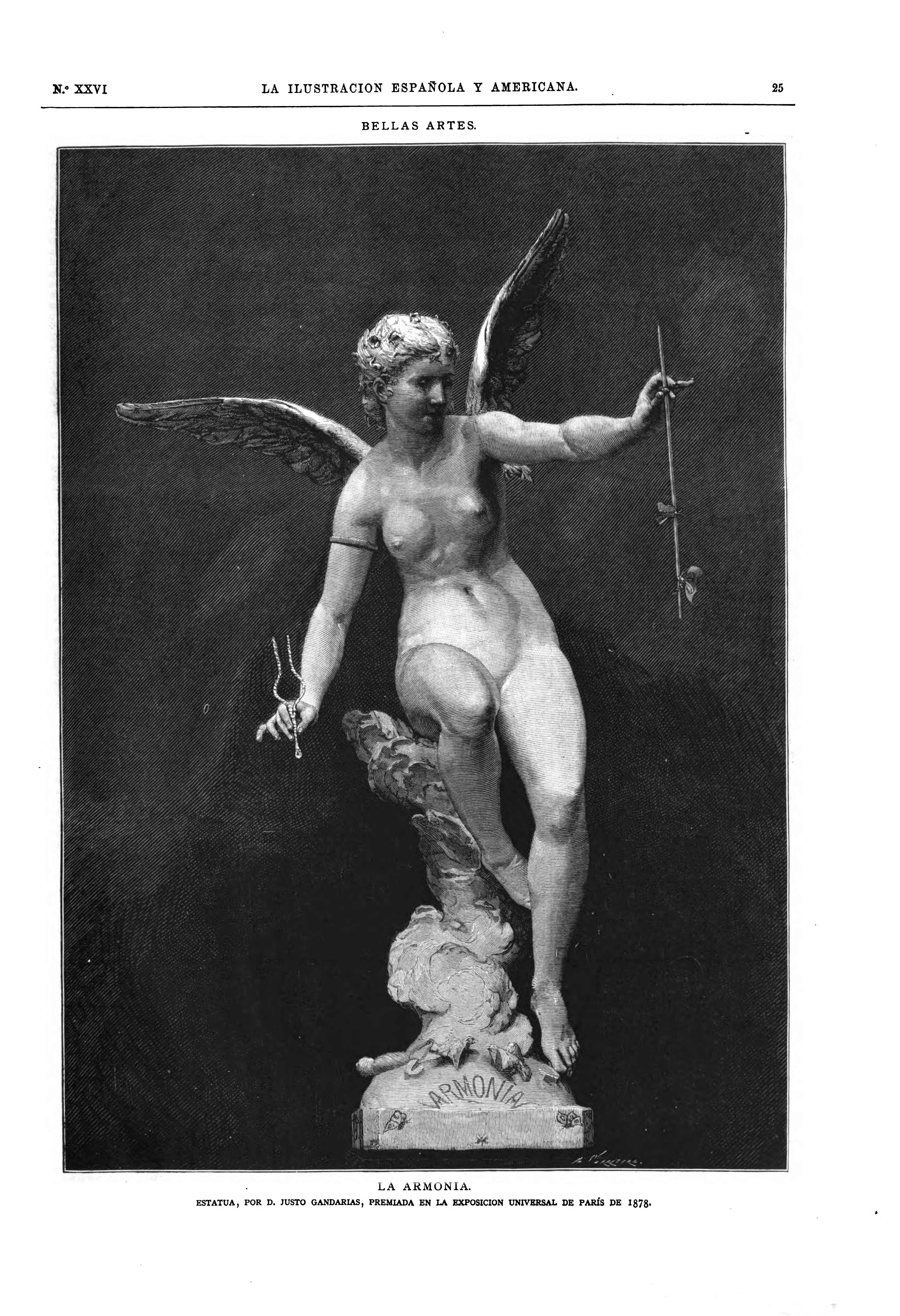 Bellas Artes. La Armonía. Estatus, por D. Justo Gandarias, premiada en la Exposición Universal de París de 1878.